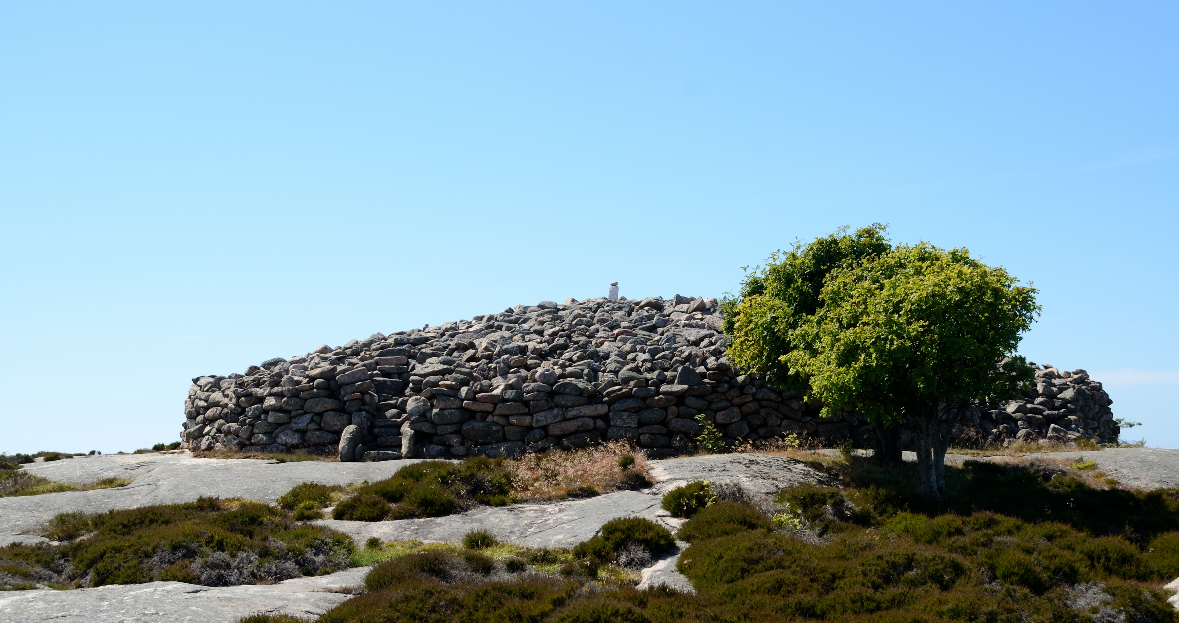 Kung Tryggves grav (Askum 395:1)